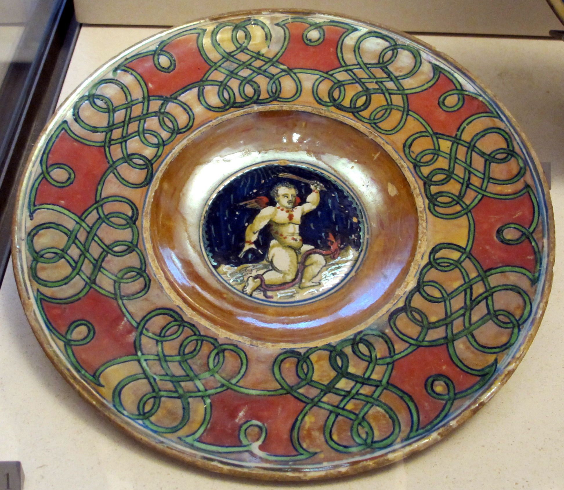 Petit Palais, Parigi